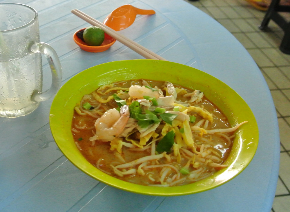 マレーシア、クチンのサラワクラクサ